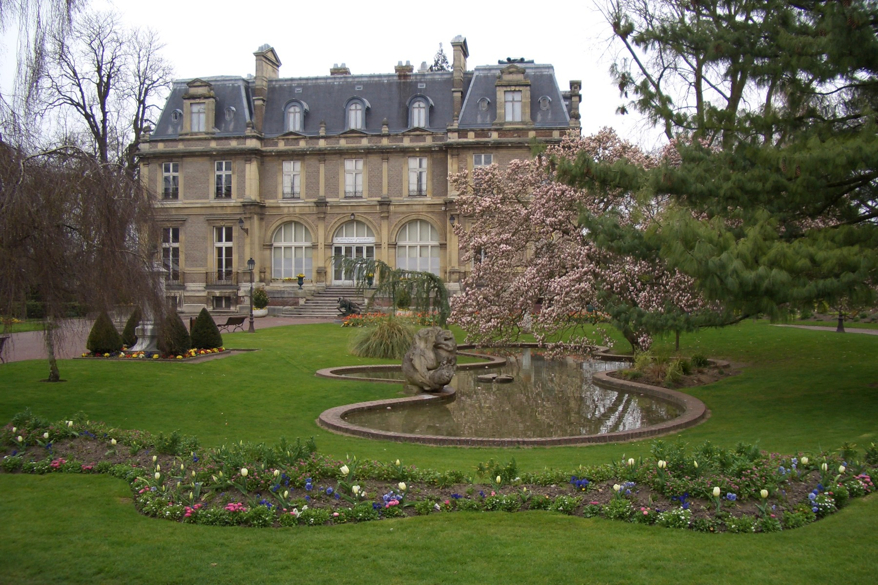 La bibliothèque d'Abbeville, nichée dans les jardins d'Emonville.